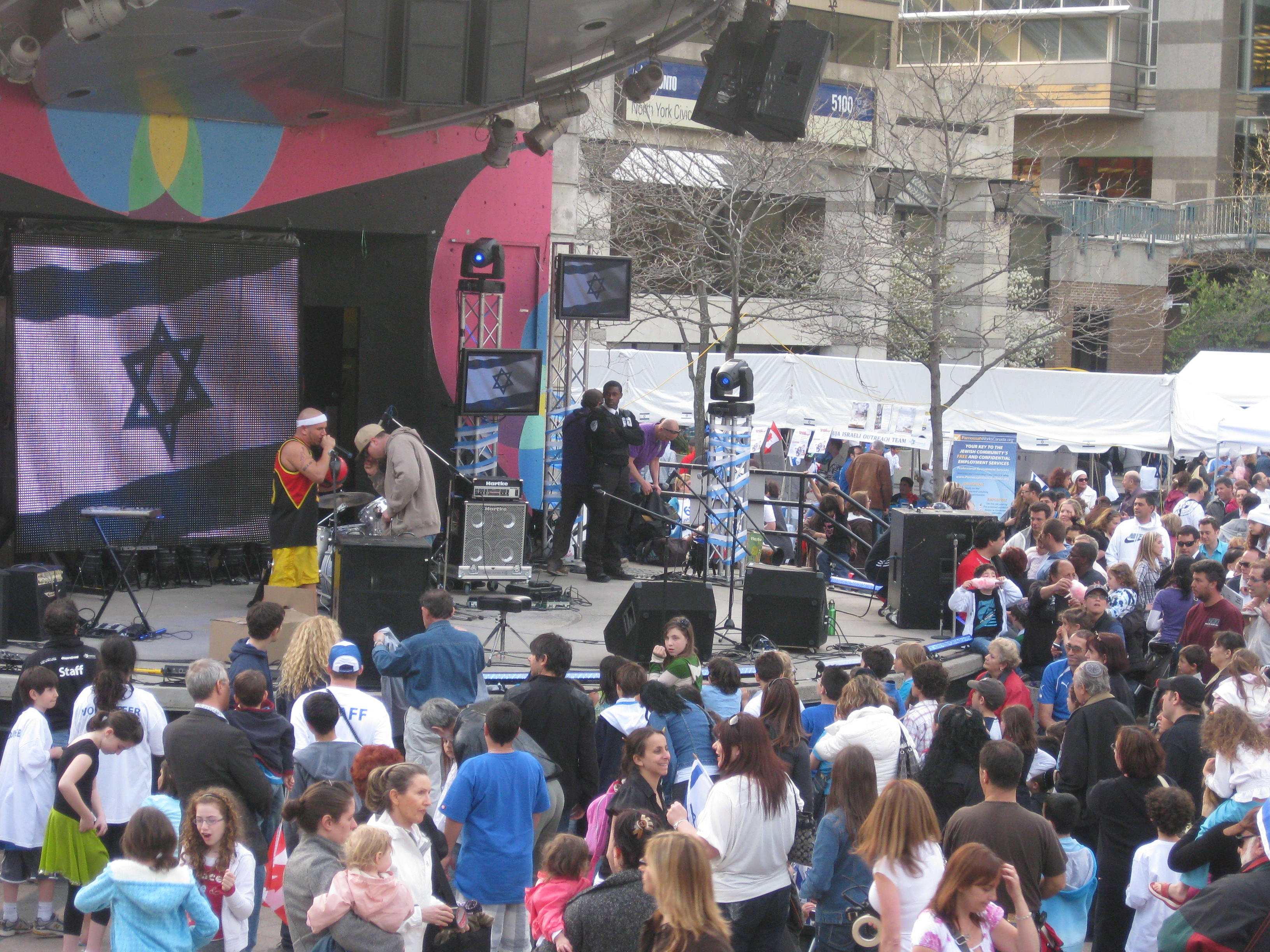 חגיגת יום העצמאות של ישראל בטורונטו